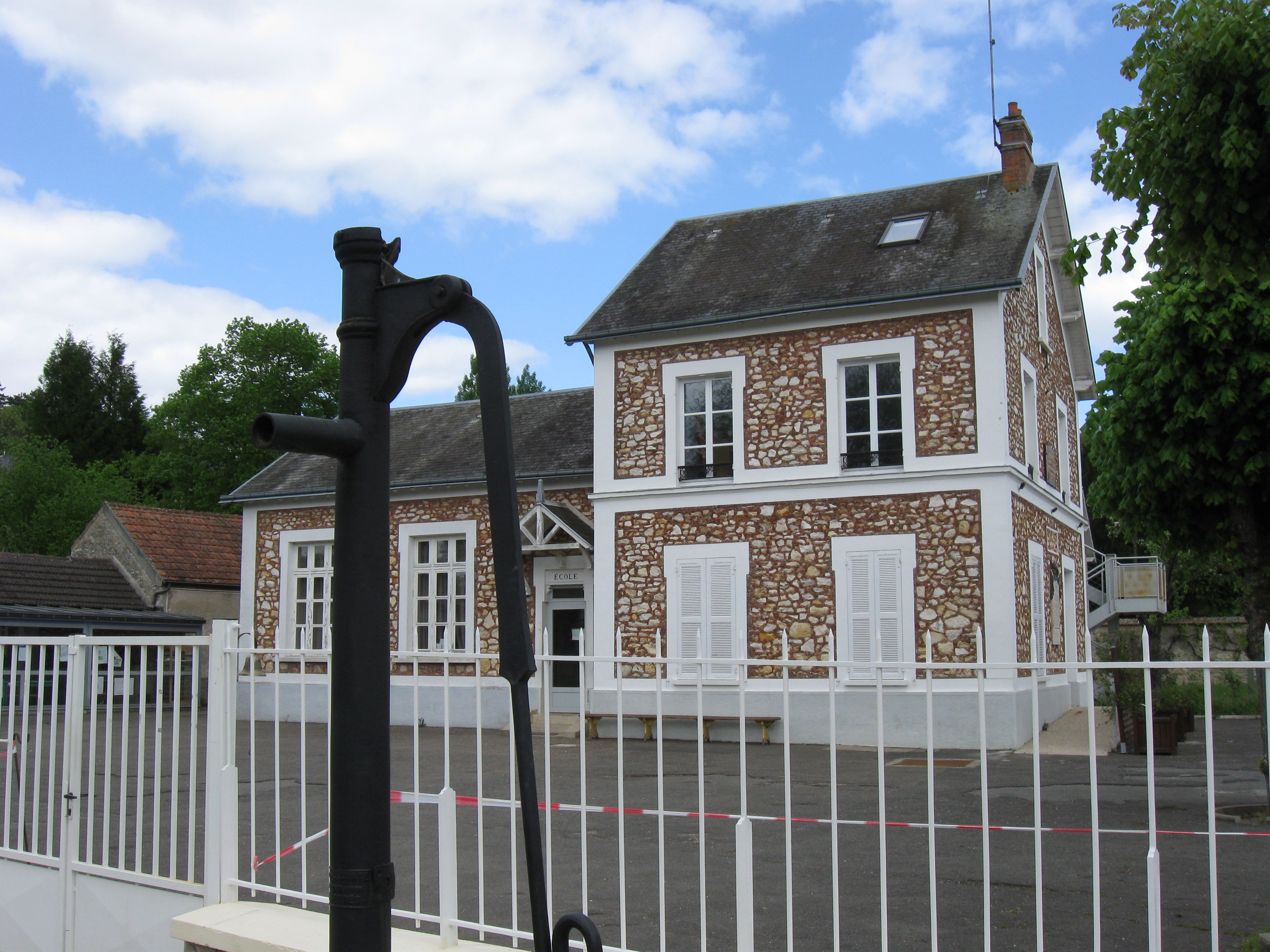 Ancienne mairie-école de Saint-Hilaire. (Essonne, région Île-de-France).